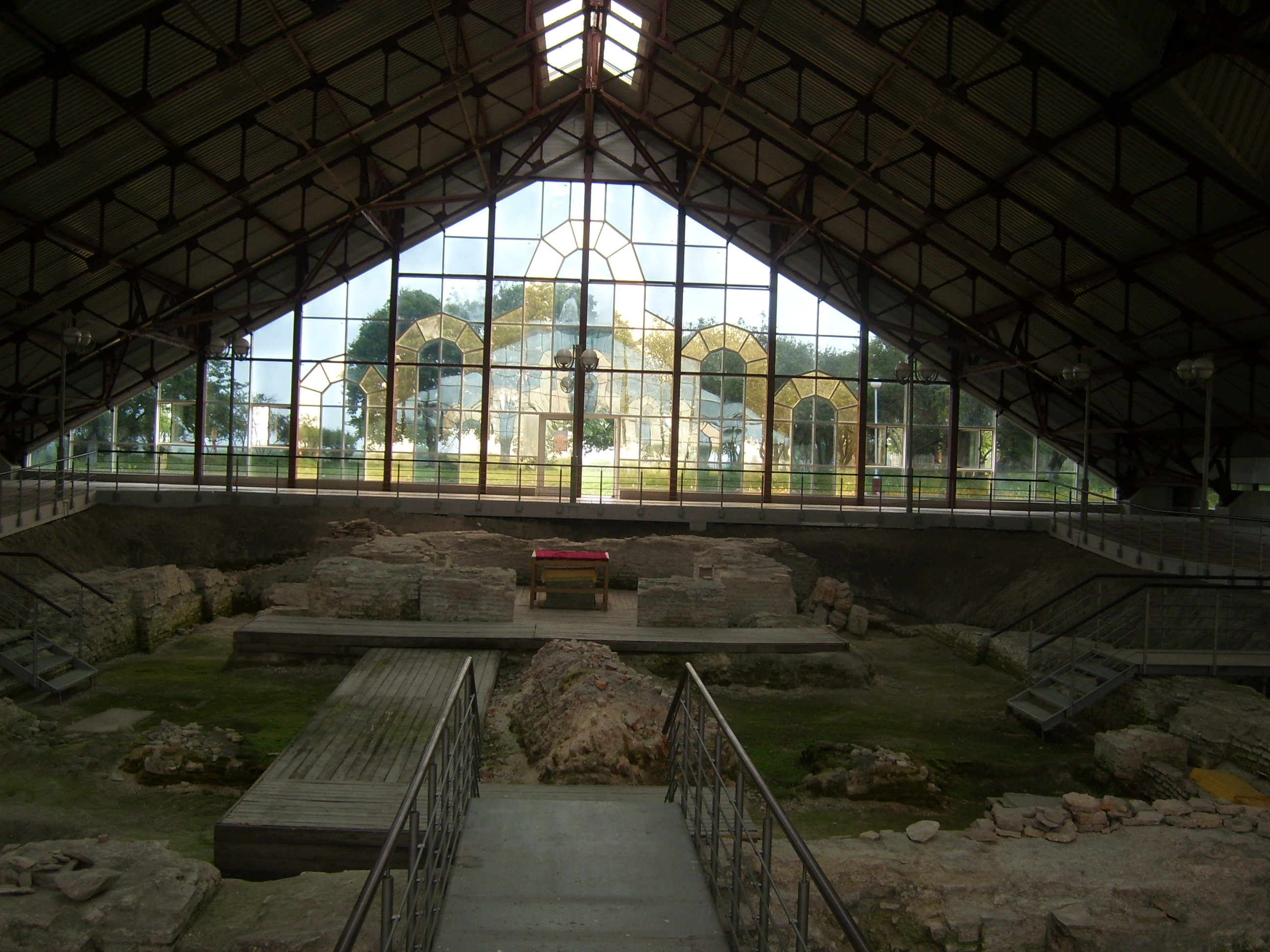 Беларуская (тарашкевіца): Гарадзішча старажытнага Турава пэрыяду раньняга сярэднявечча. г. Тураў This is a photo of Belarusian heritage monument. Reference number: 313В000360 ( WLM)